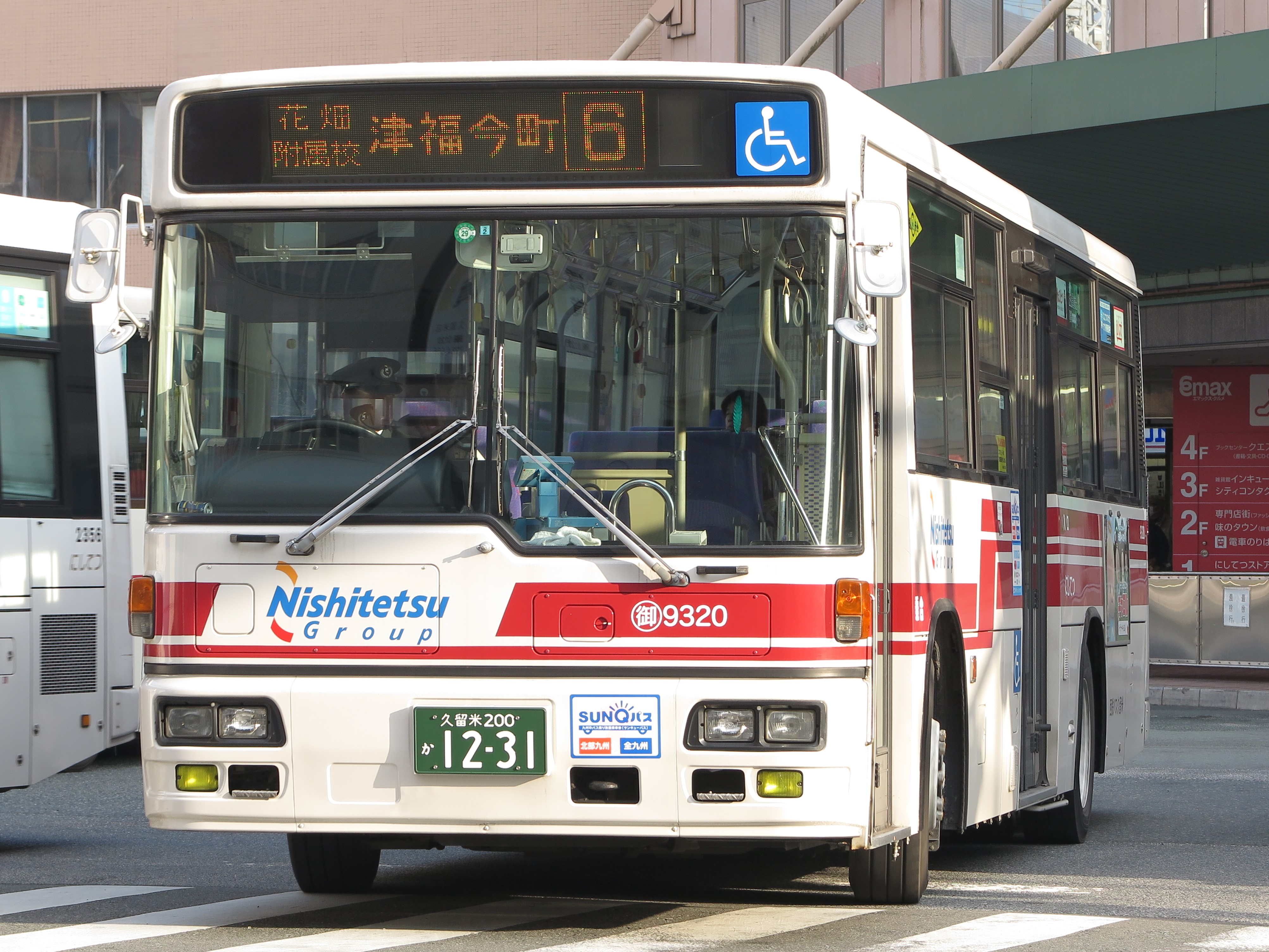 2017年1月4日、西鉄久留米バスセンターにて撮影。西鉄バス久留米に所属する2005年式日産ディーゼル・スペースランナーRA（KL-UA452MAN）。社番は9320。